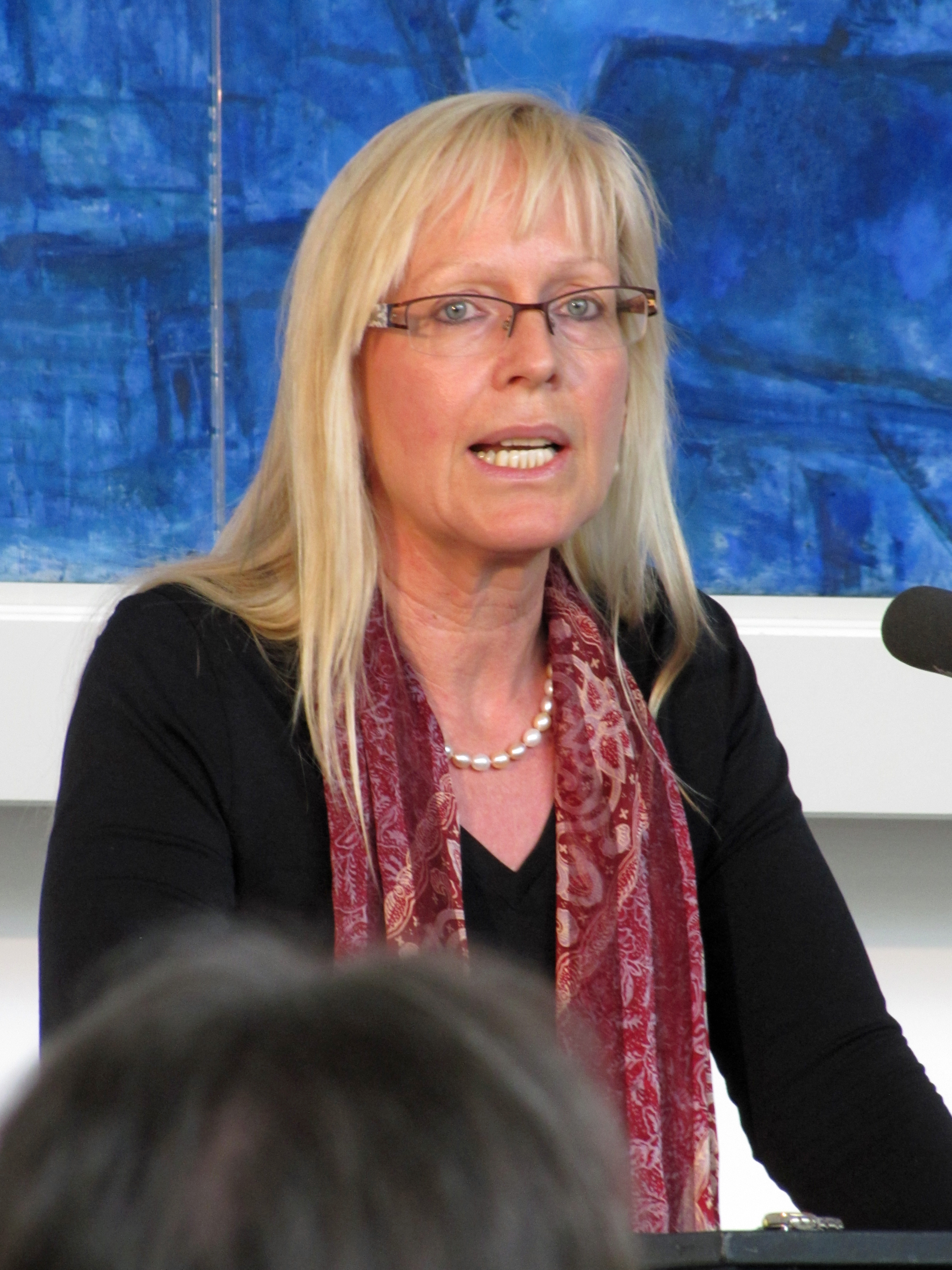 Susanne Schröter, Professorin für „Ethnologie kolonialer und postkolonialer Ordnungen“ an der Uni-Ffm, bei den Römerberggesprächen im April 2014 in Frankfurt am Main.